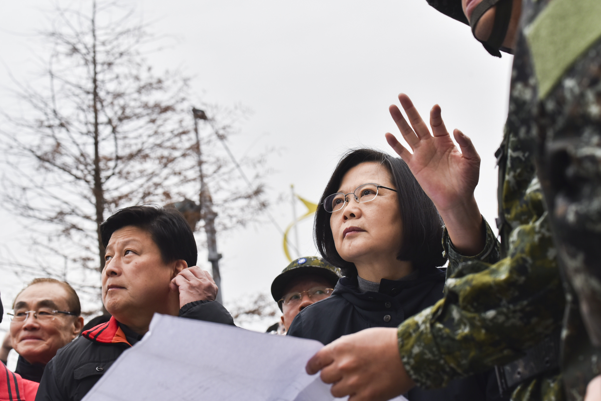 02.07 總統勘查花蓮震災，傅崐萁縣長、馮世寬部長也一同前往現場視察災情。